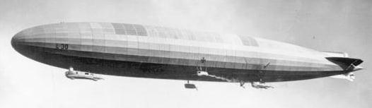 L 30 på himlen